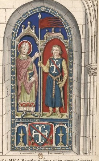 dessin relevé pour Roger de Gaignières.